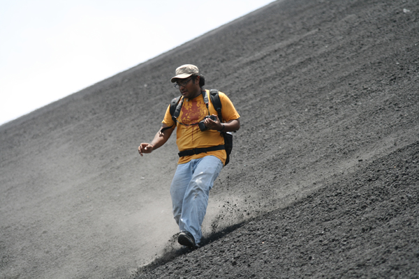 Bajando el Cerro Negro Cortesía Diana Nivia